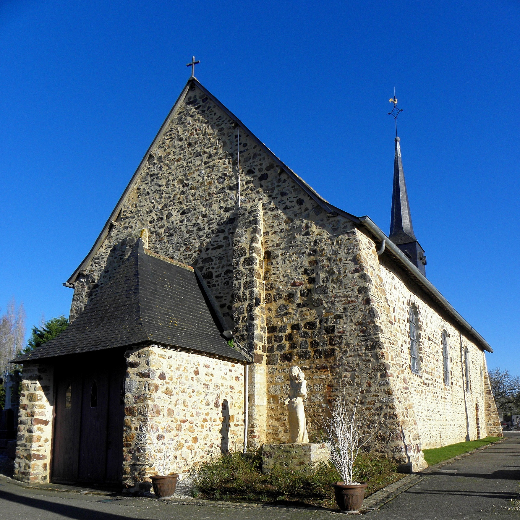 Église Notre-Dame-de-l'Assomption de Bréal-sous-Vitré (35). Façade occidentale.